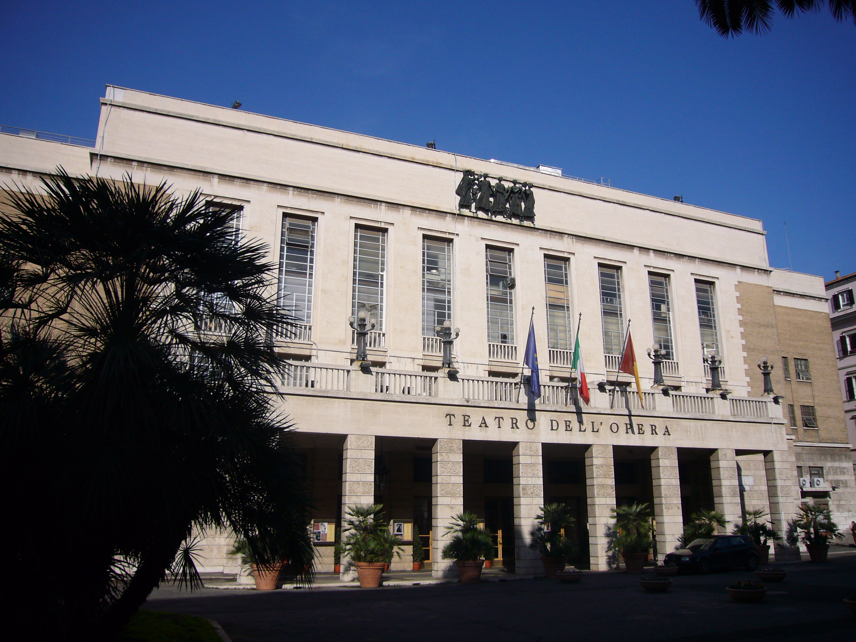 Roma, Teatro dell'Opera, già Teatro Costanzi Categoria:Teatri di Roma